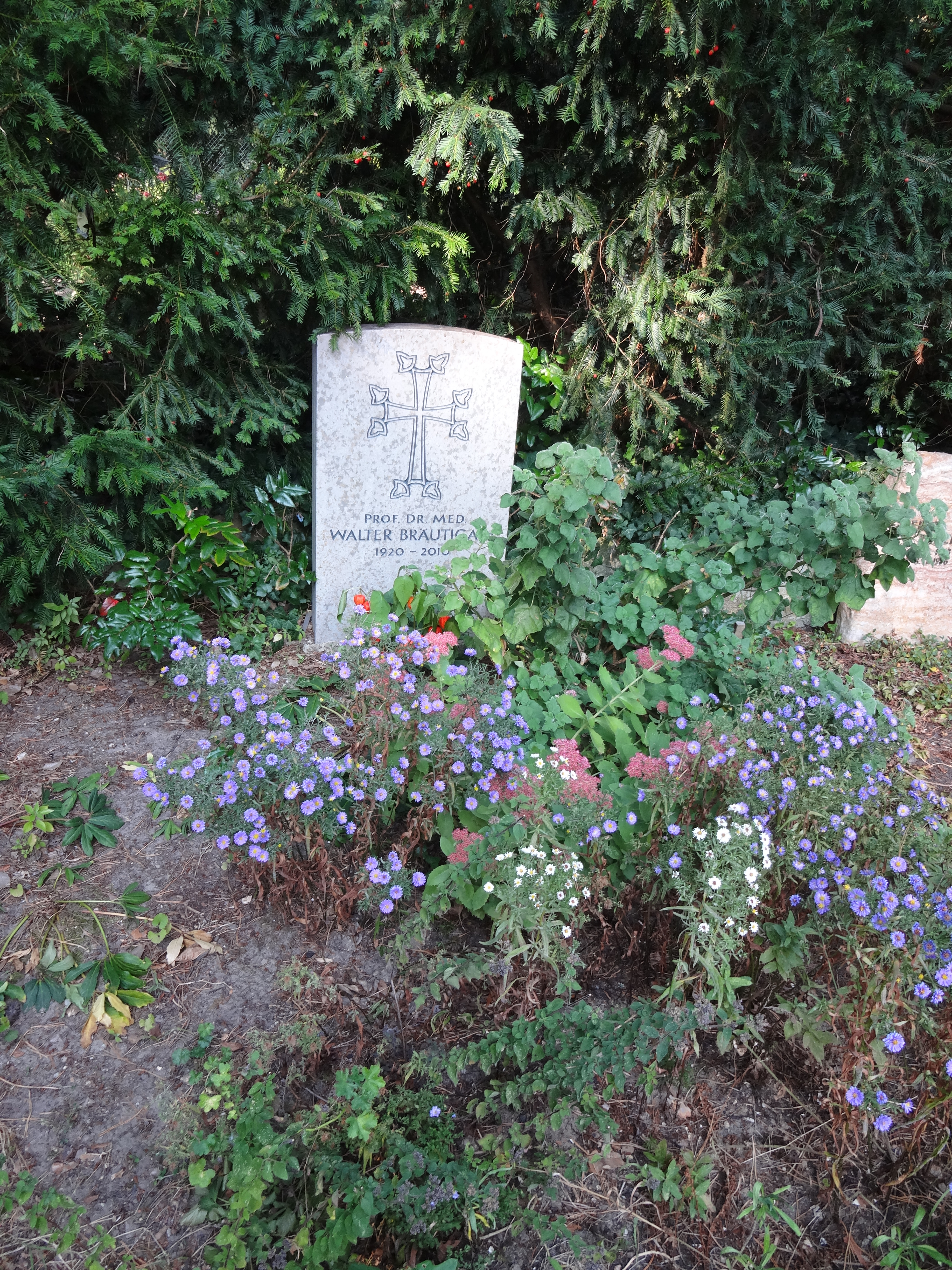 Grab von Prof. Walter Bräutigam auf dem Waldfriedhof Dahlem in Berlin